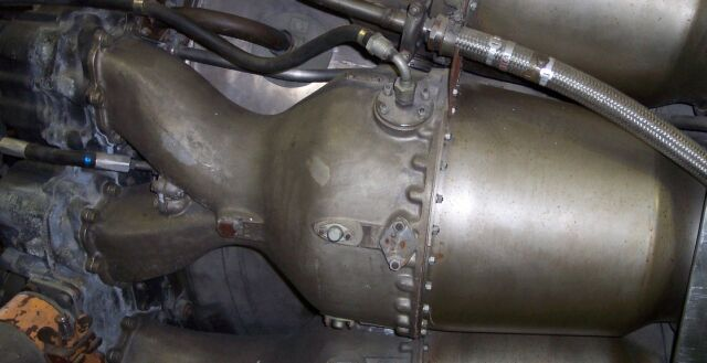 Brennkamer eines Luftstrahltriebwerkes